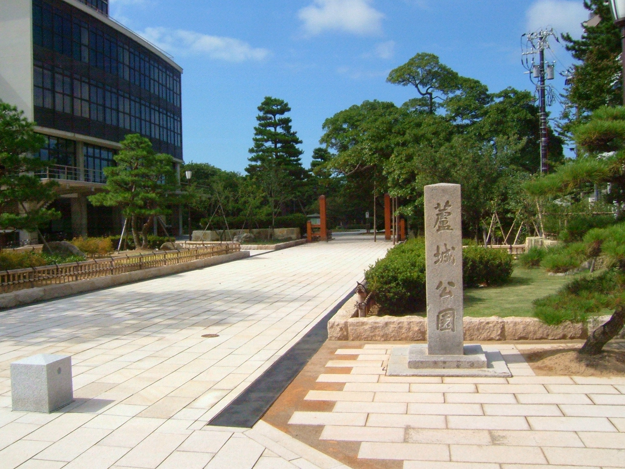 芦城公園（石川県小松市）